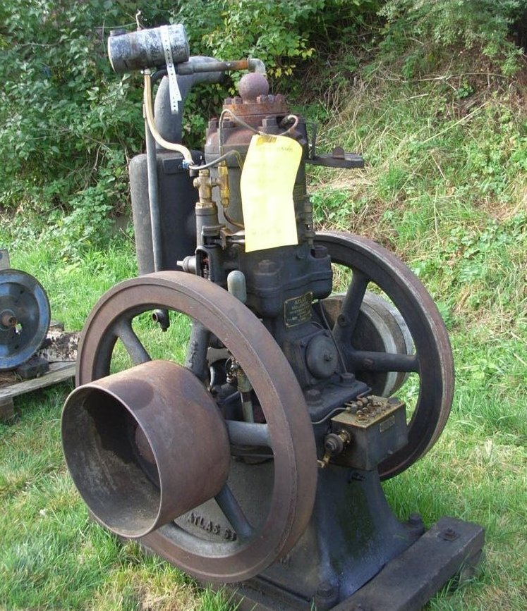 Atlas glødehovudmotor.